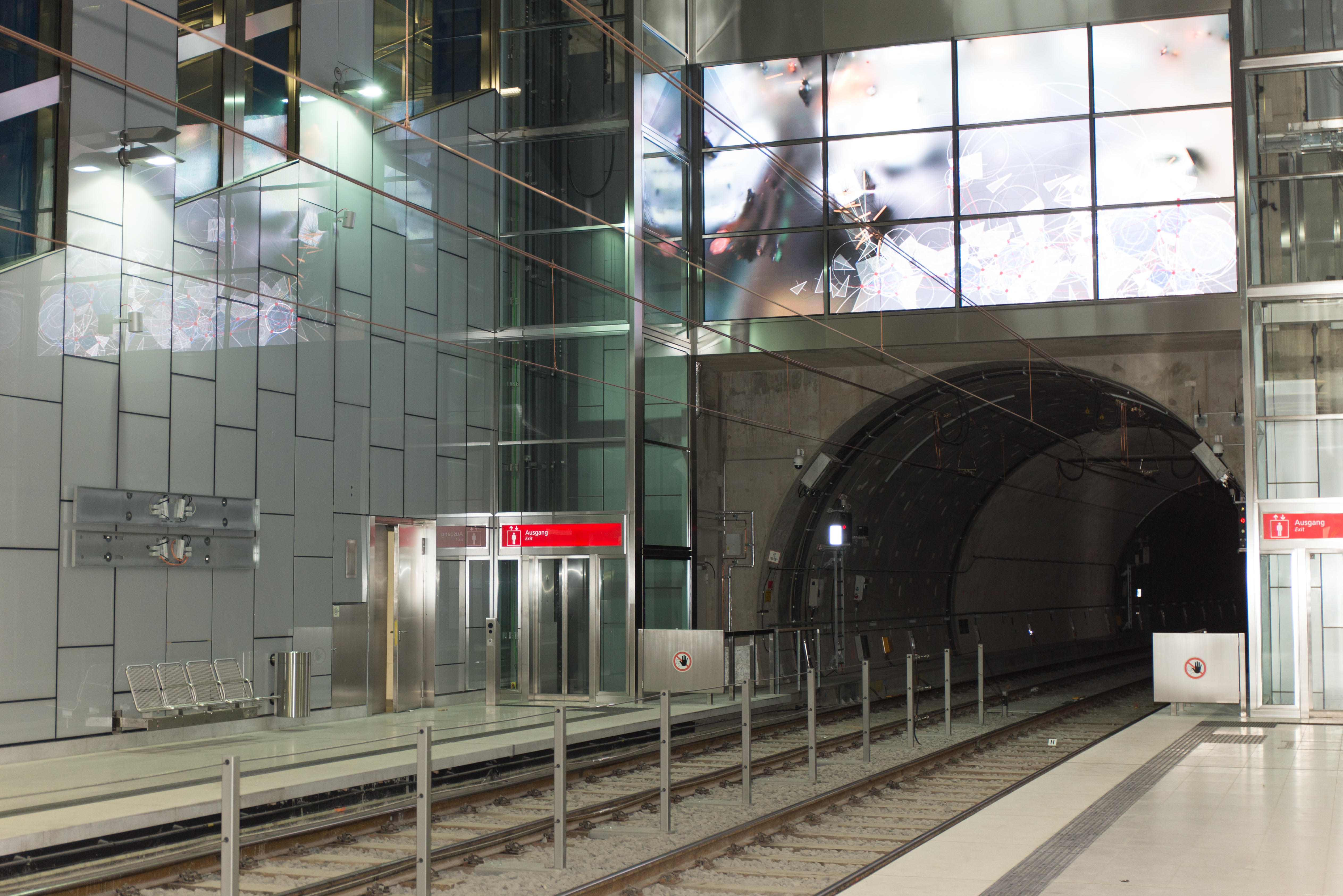 Wehrhahnlinie, U-Bahnhof Schadowstraße, Kunst am Bau